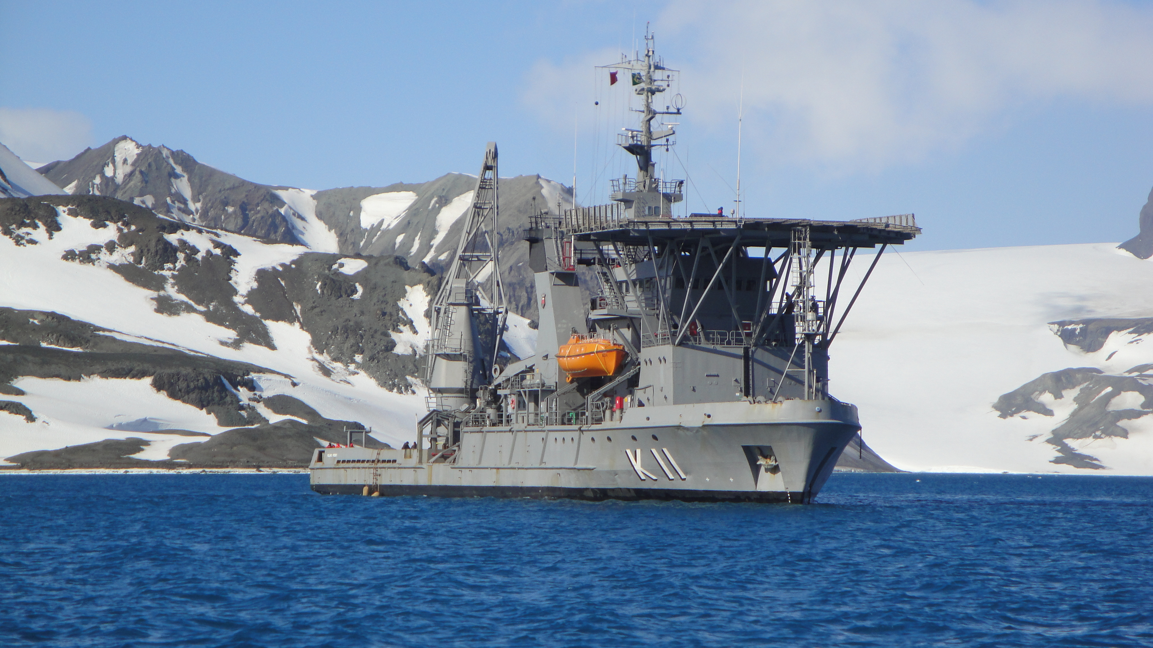 Arquivo liberado pela Marinha do Brasil através de projeto GLAM com Wiki Educação Brasil